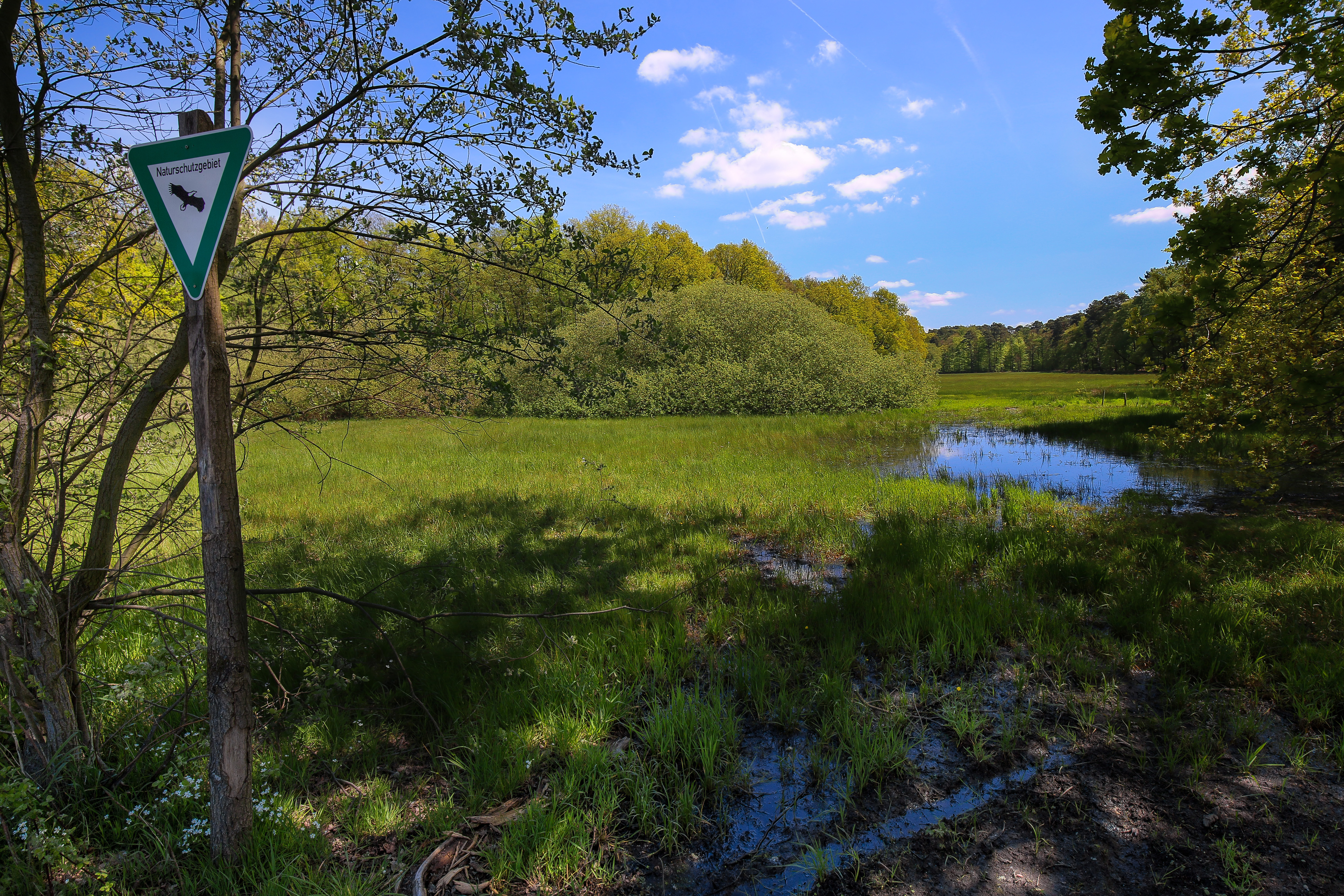 Wiese im Faulbruch zwischen Erzhausen und Wixhausen, Naturschutzgebiet „Faulbruch bei Erzhausen“ (NSG 1432028)